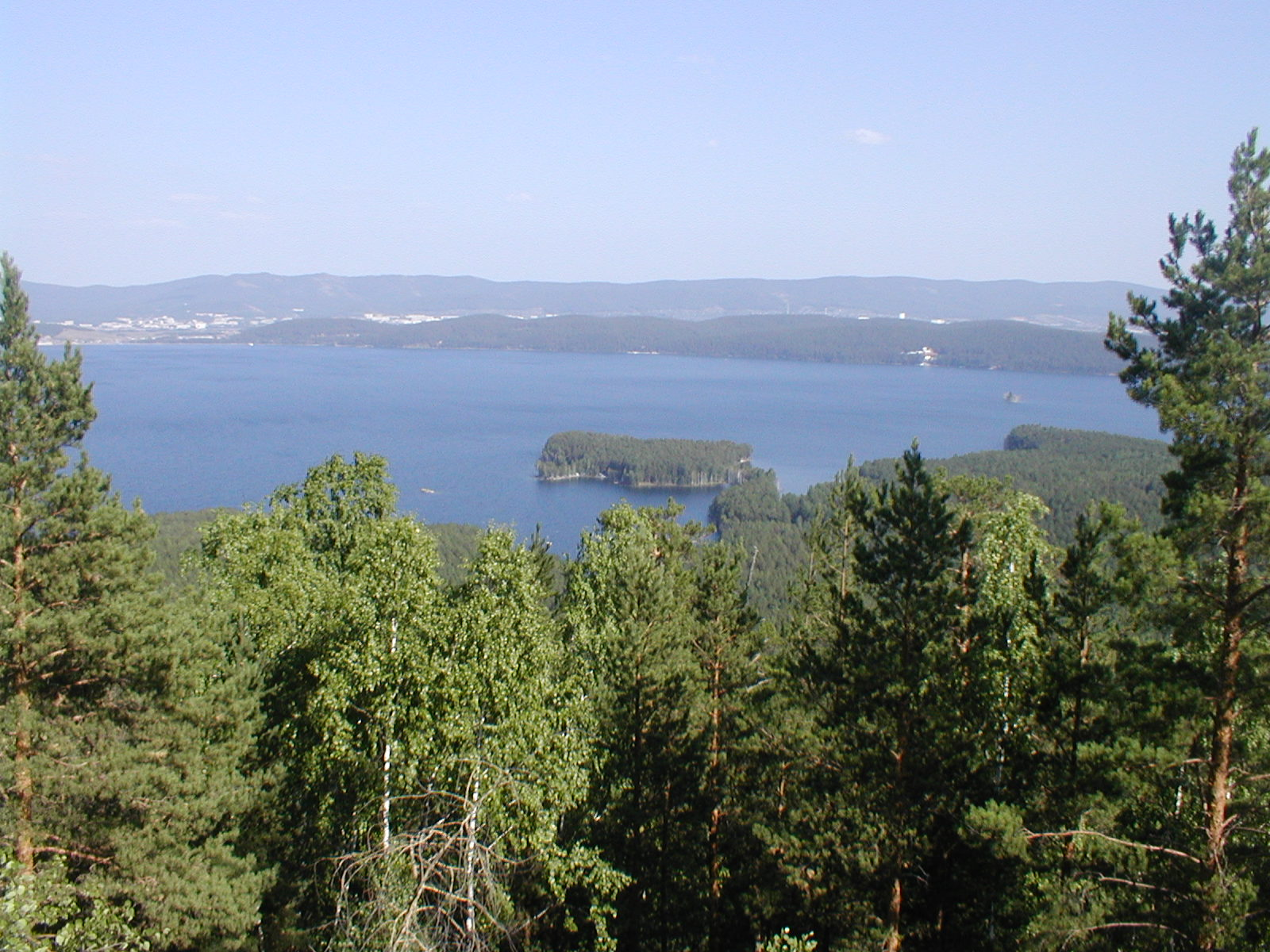 Вид на озеро Тургояк с вершины одной из гор, окружающих озеро. В далеке видна часть города Миасс